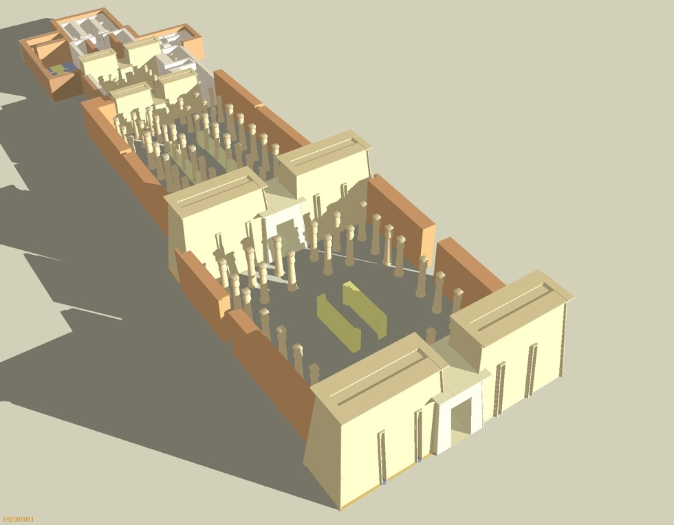 Proposition d'élévation du grand temple d'Amon de Napata à la période napatéenne